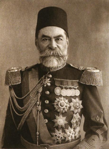 Mukhtar Pasha (1852-1892)